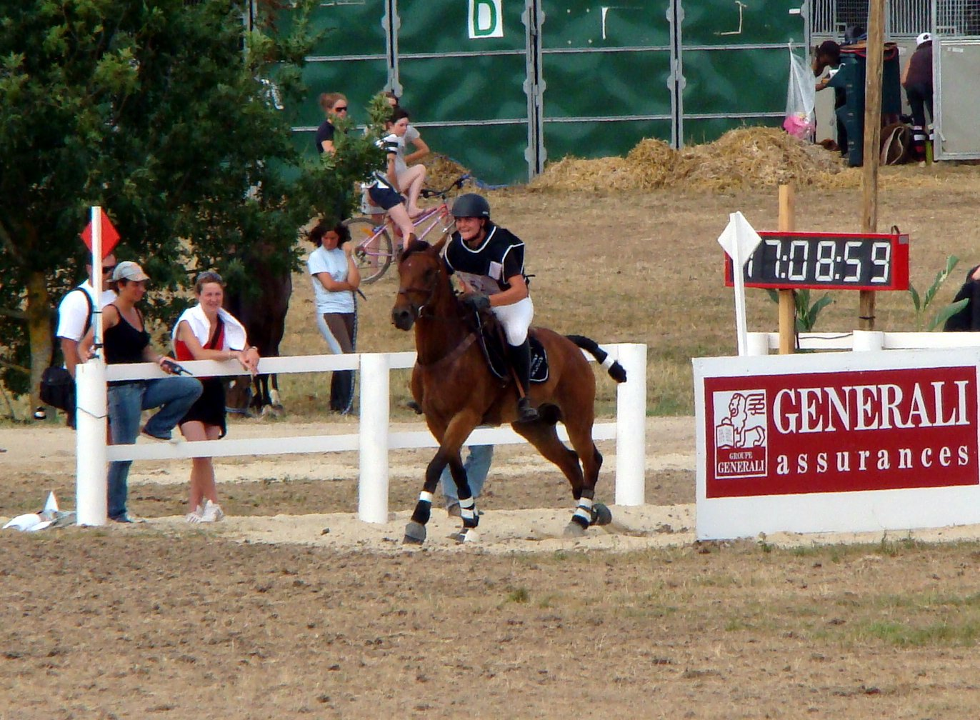 CCE Lamotte 2008